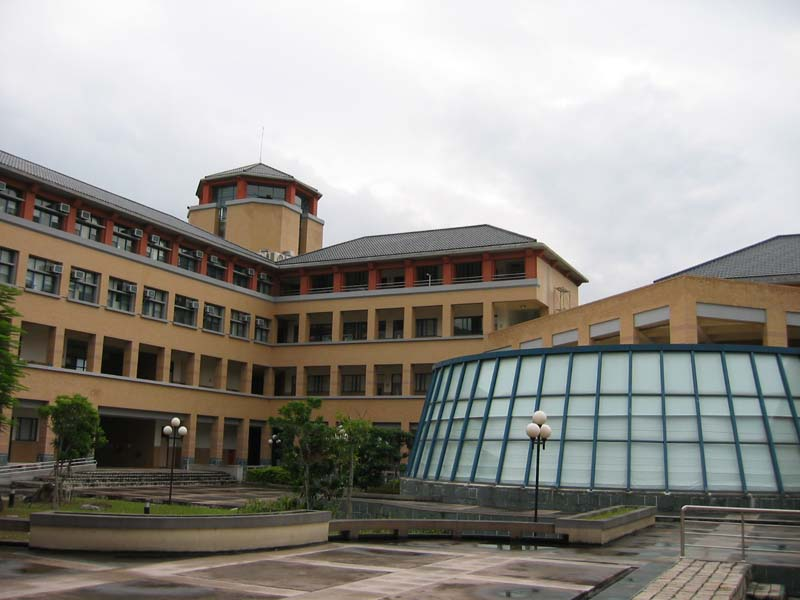 國立東華大學共同教育大樓